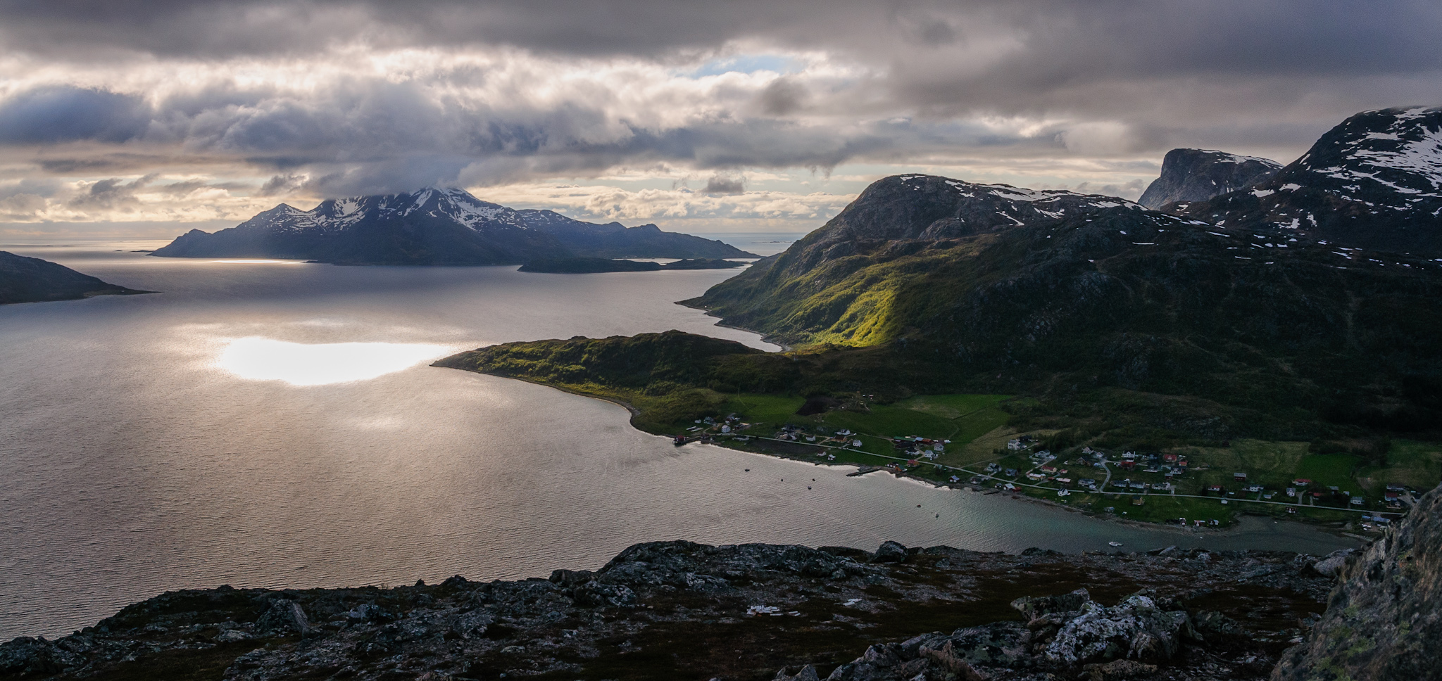 Skulsfjord and Vengsøya, from Trehørningen